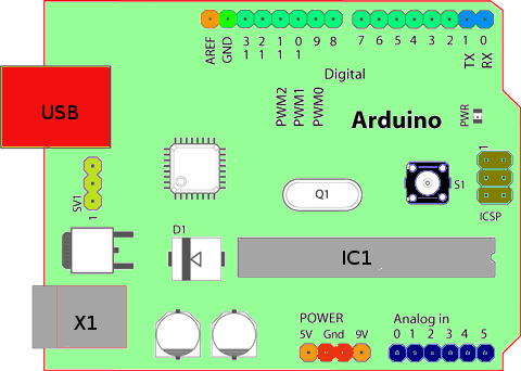 Pines